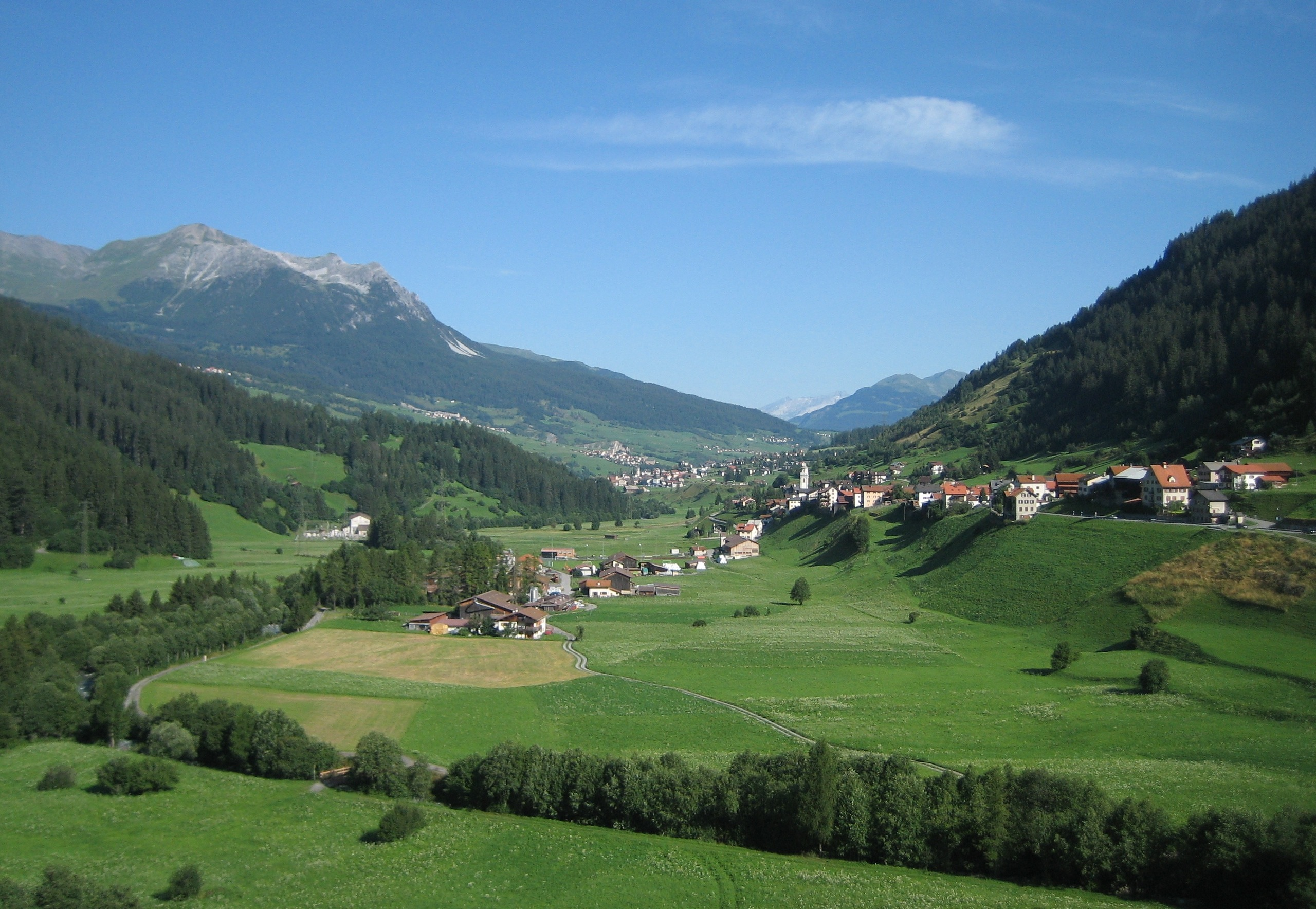 Sot Gôt, das untere Teil vom Oberhalbstein mit Tinizong und Savognin Richtung Norden